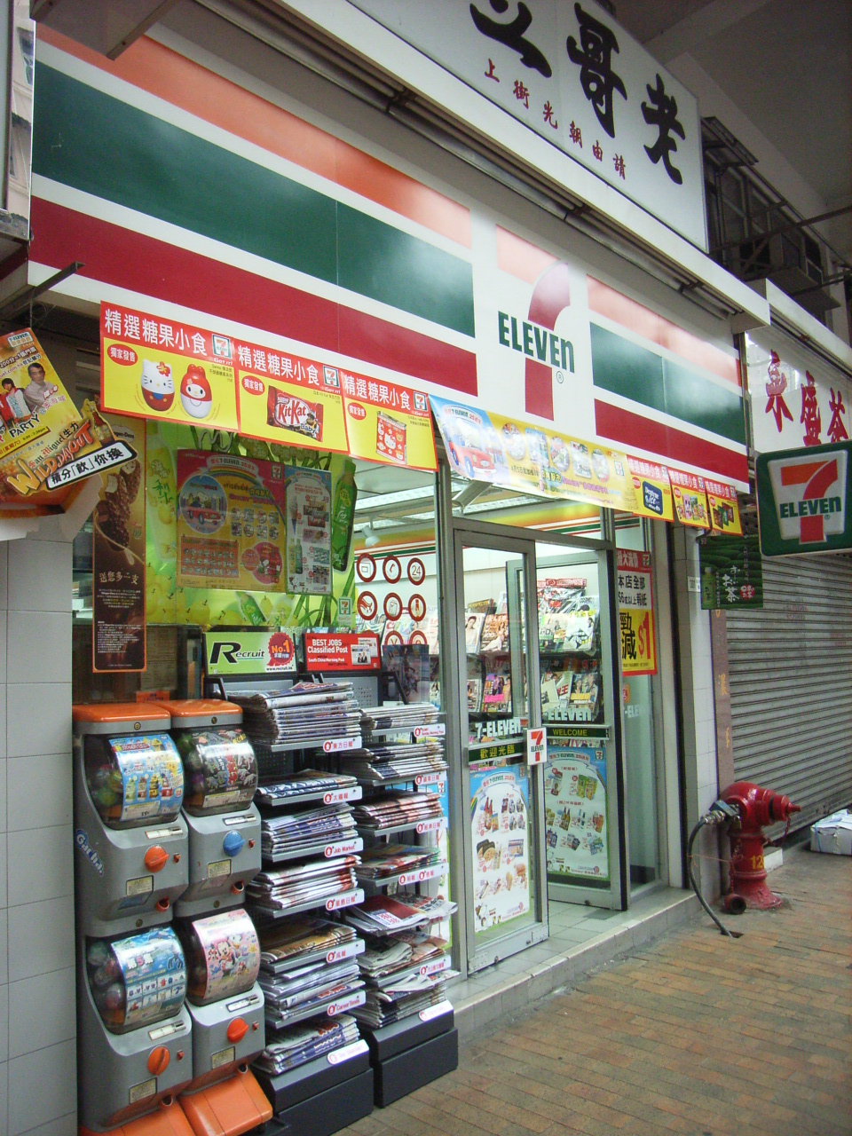 HK 7-Eleven Shop 7-11 亦稱七‧十一便利店